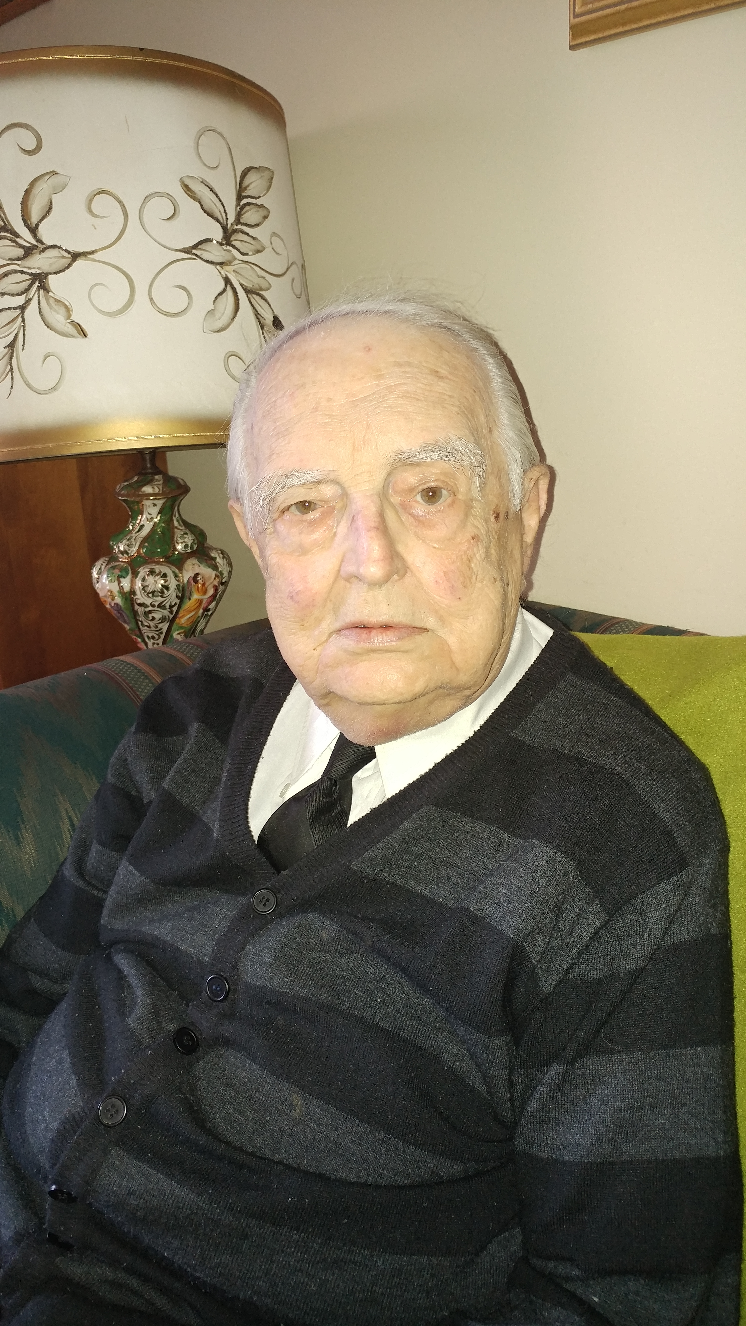 Pungúr József nyugalmazott lelkipásztor Edmontoni otthonában